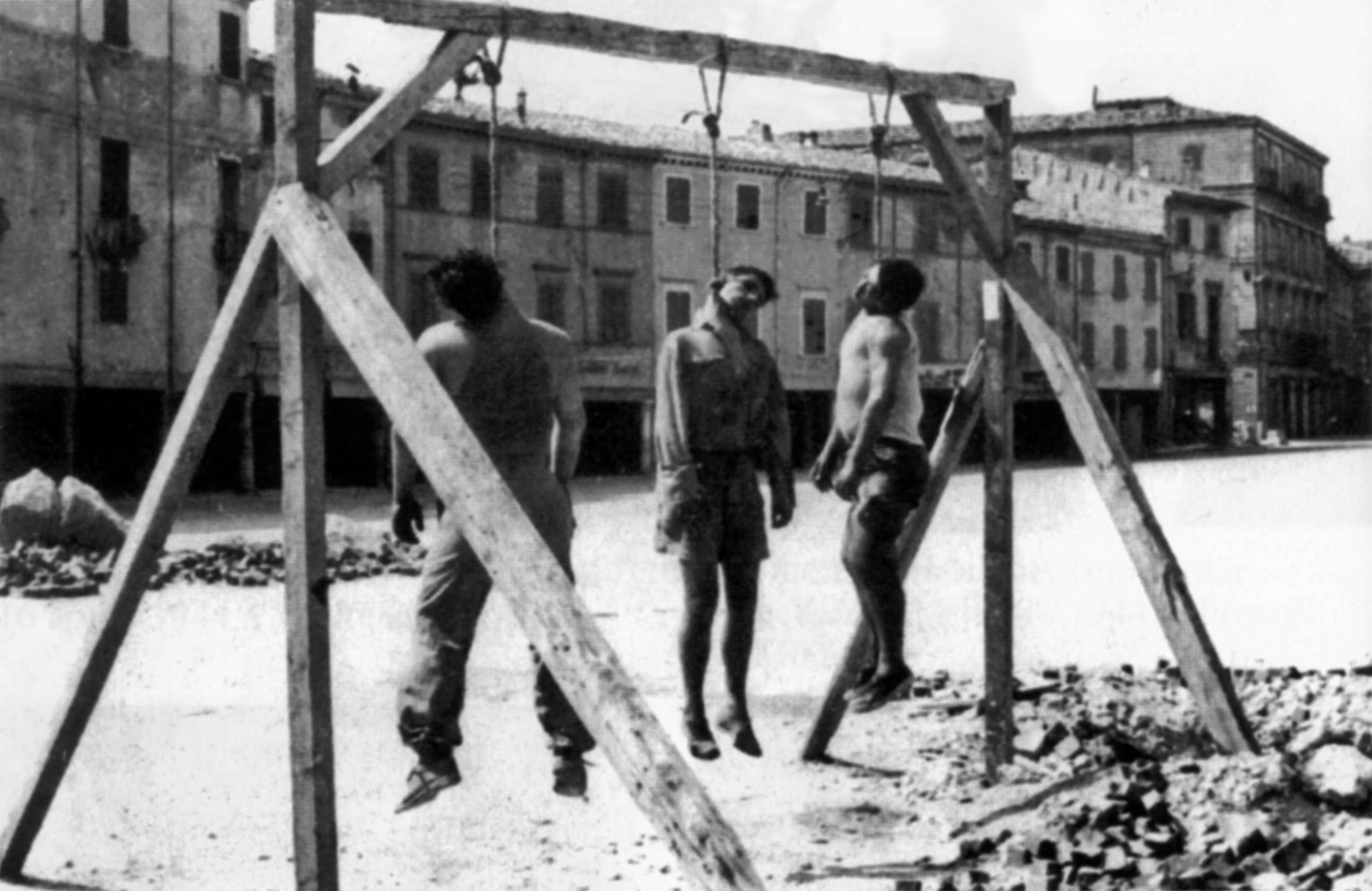 Mario Cappelli, Luigi Nicolò, Adelio Pagliarani ahorcados en Rímini (1945)